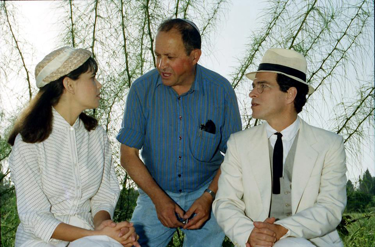 אדיר זיק מביים את השחקנים מיכל זוארץ וזאב שימשוני בדרמה "רופא כפרי"